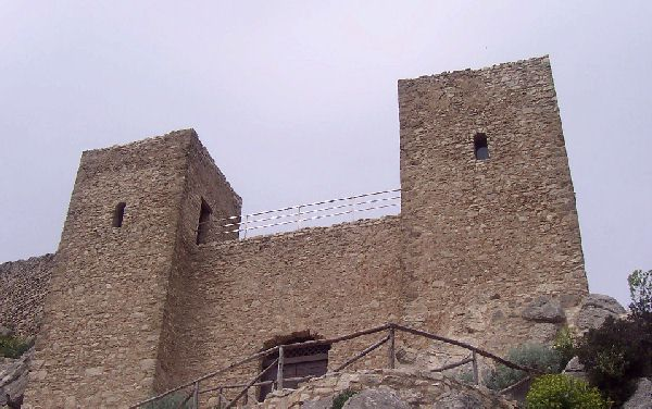 Motta San Giovanni, foto delle torri del Castello di Sant'Aniceto. Foto concessa dall'autore Ags.